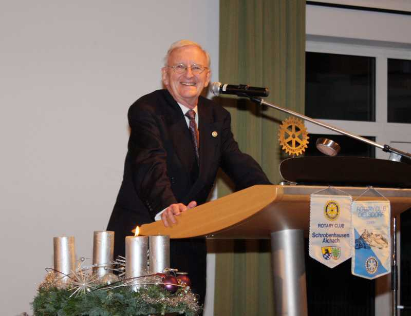 Am Rednerpult zu Hause